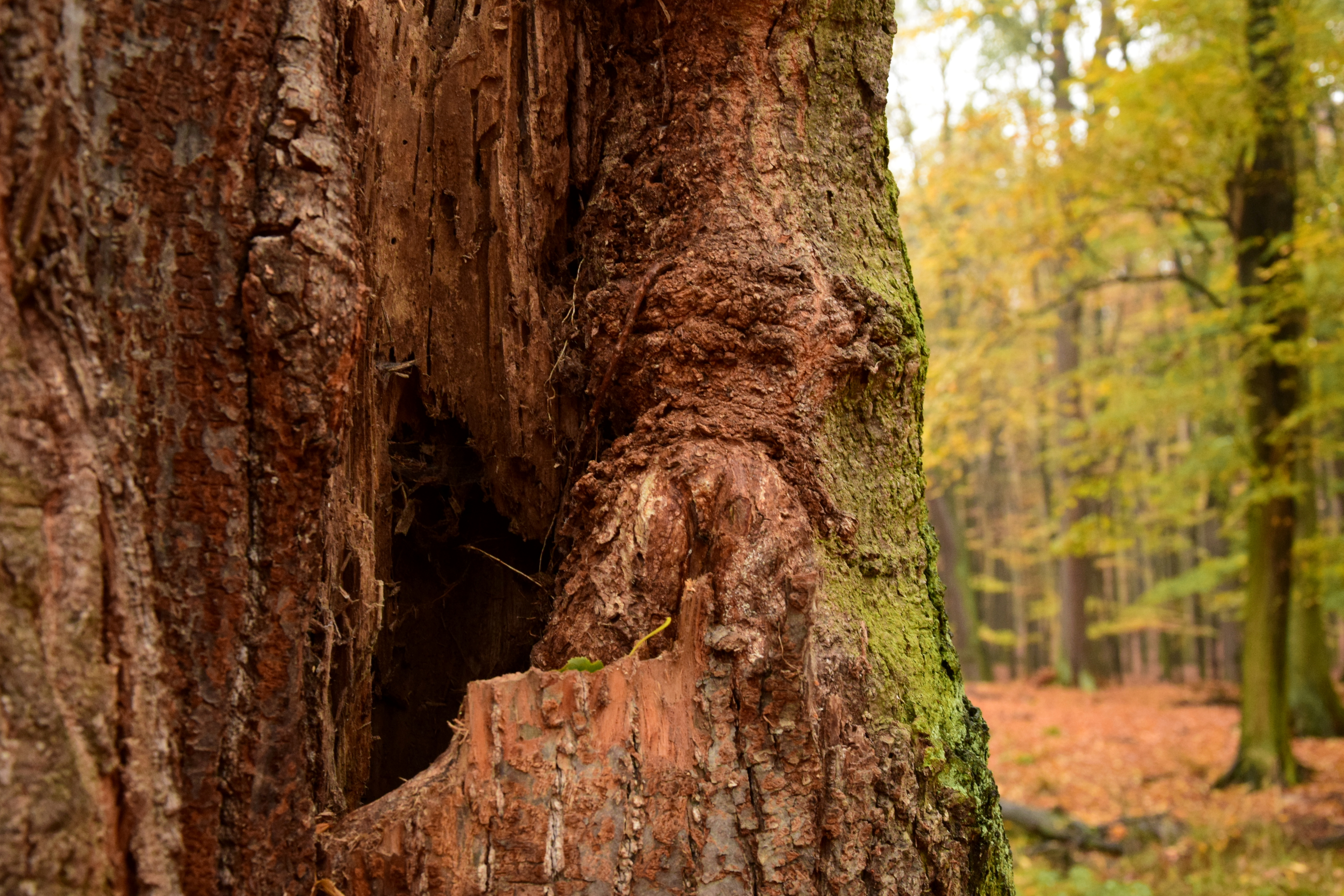 Přírodní památka Červený Hrádek – dutina ve starém stromě u hlavní cesty